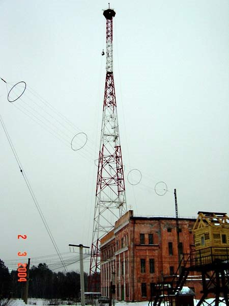 Мегетская телебашня занимает 5-е место в России по высоте среди подобных сооружений.